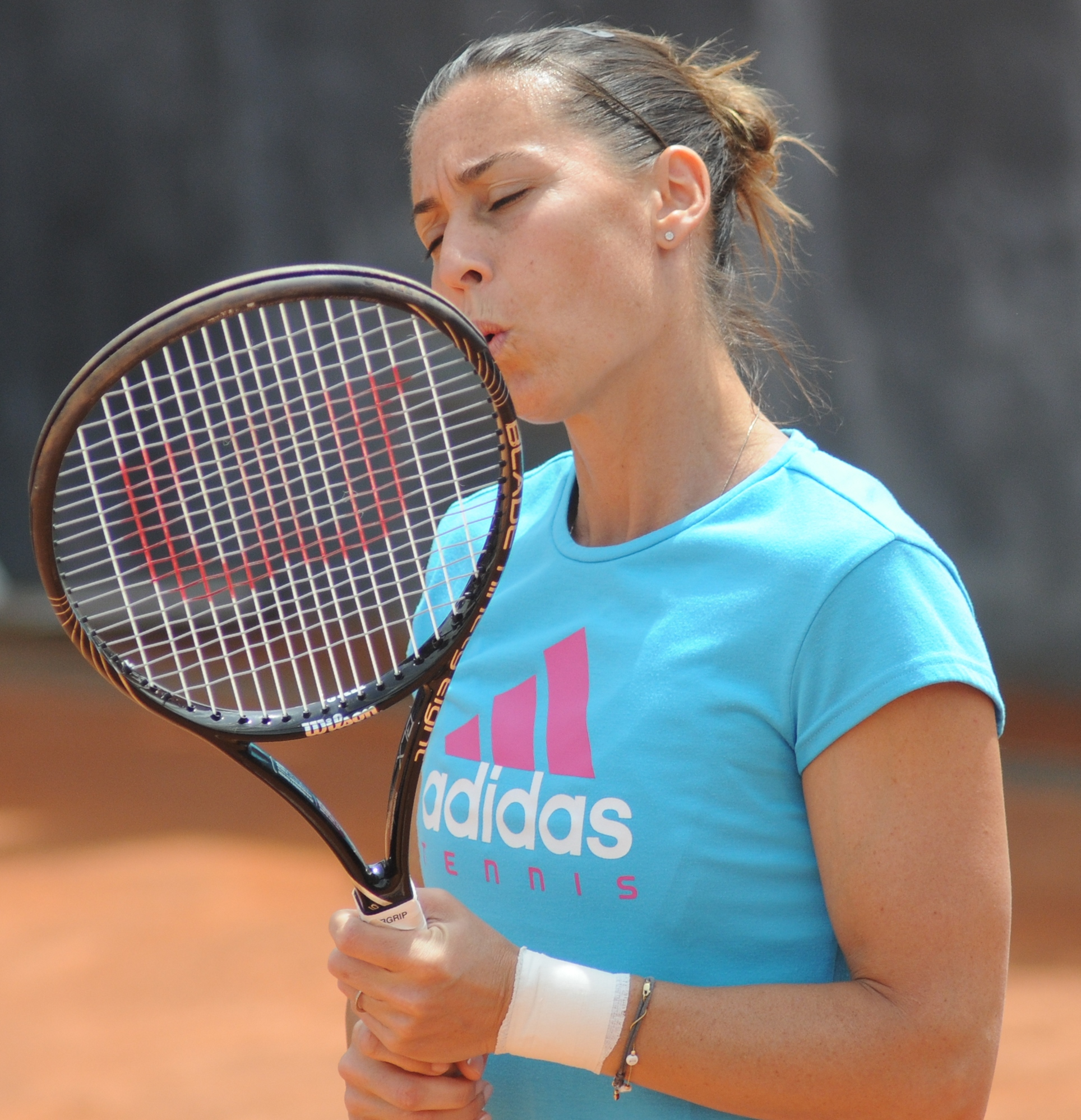 Flavia Pennetta at the 2014 Internazionali BNL d'Italia